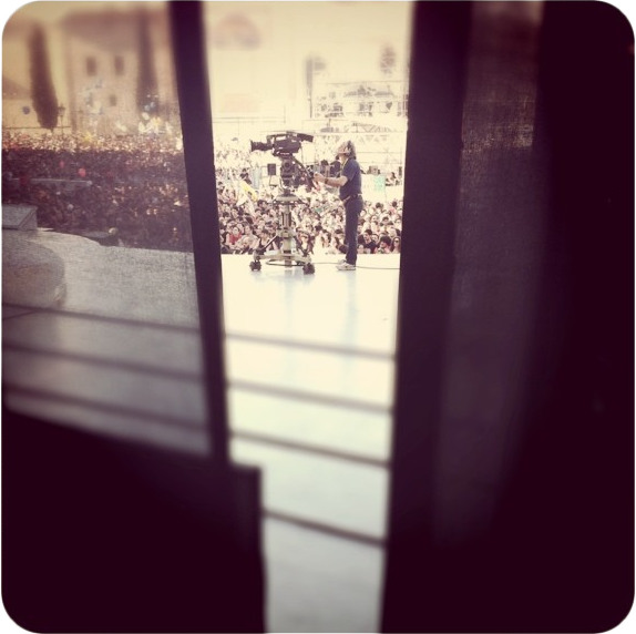 Scorcio di Piazza di Porta San Giovanni dal Palco del Concerto del Primo Maggio 2011